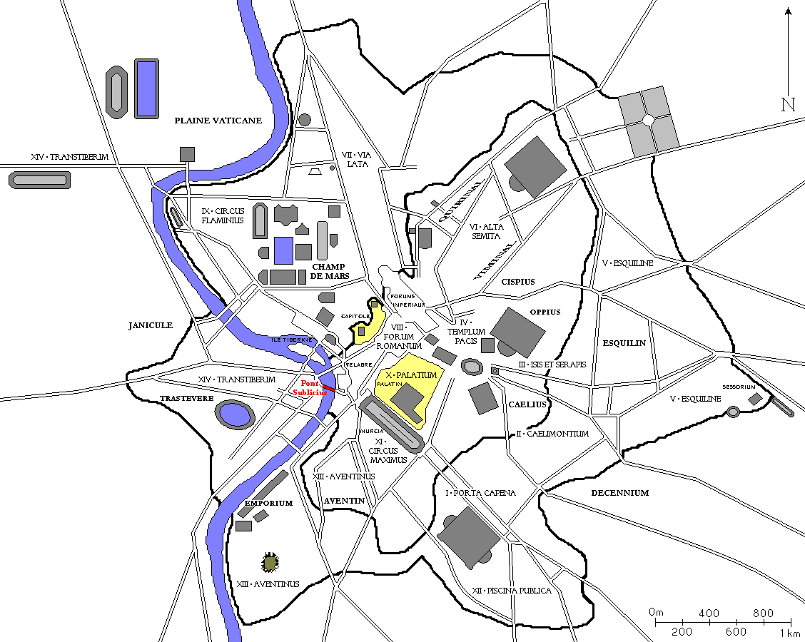 Plan de Rome redessiné à partir de diverses sources. Tous les bâtiments importants construits jusqu'à la fin de l'Empire romain sont dessinés, ainsi que les régions d'Auguste et les collines de Rome.